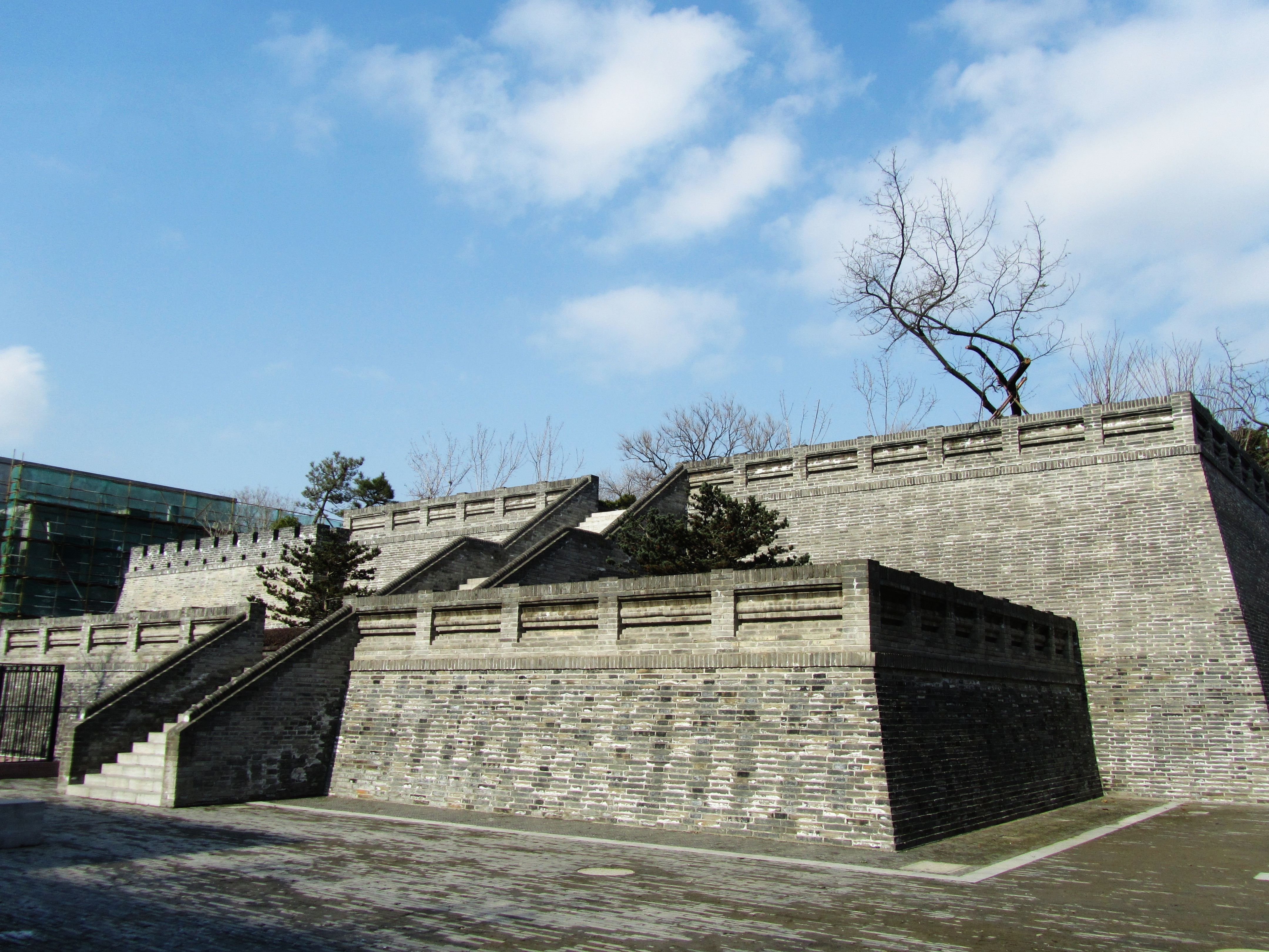 南通北极阁城墙遗址（原北城门），南侧。